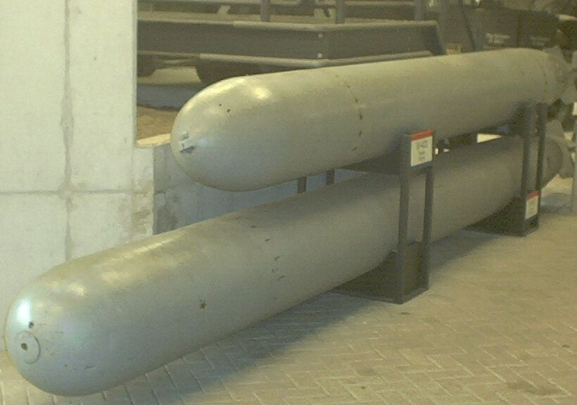 Englische Torpedos aus dem 2. Weltkrieg, eigenes Bild, GNU-FDL